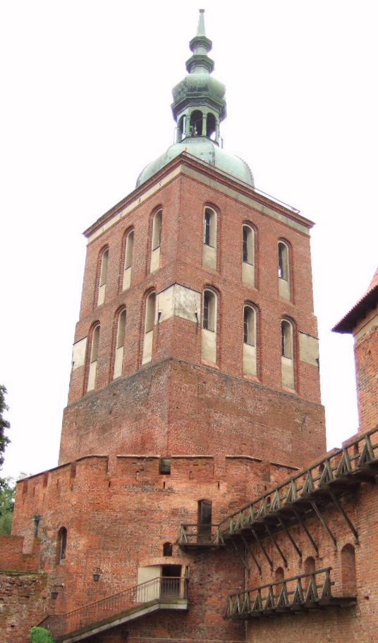 Dzwonnica we Fromborku.